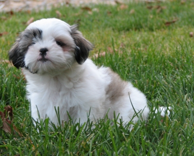 Shih Tzu Puppy